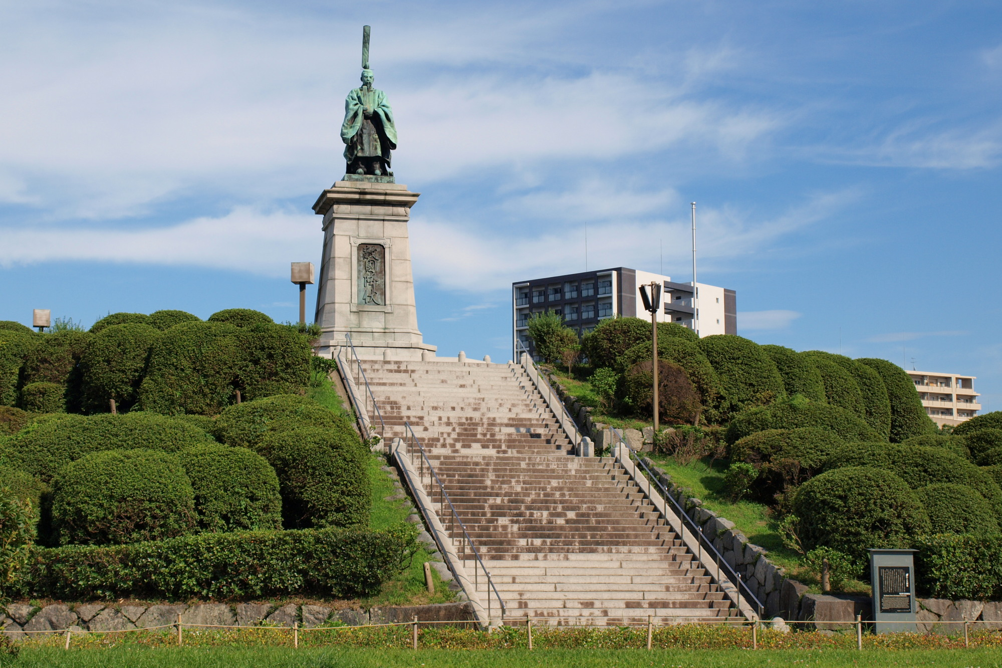 福岡市東公園の様子。